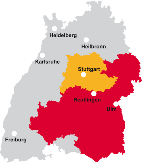 Verbandsgebiete der kommunalen Rechenzentren in BW